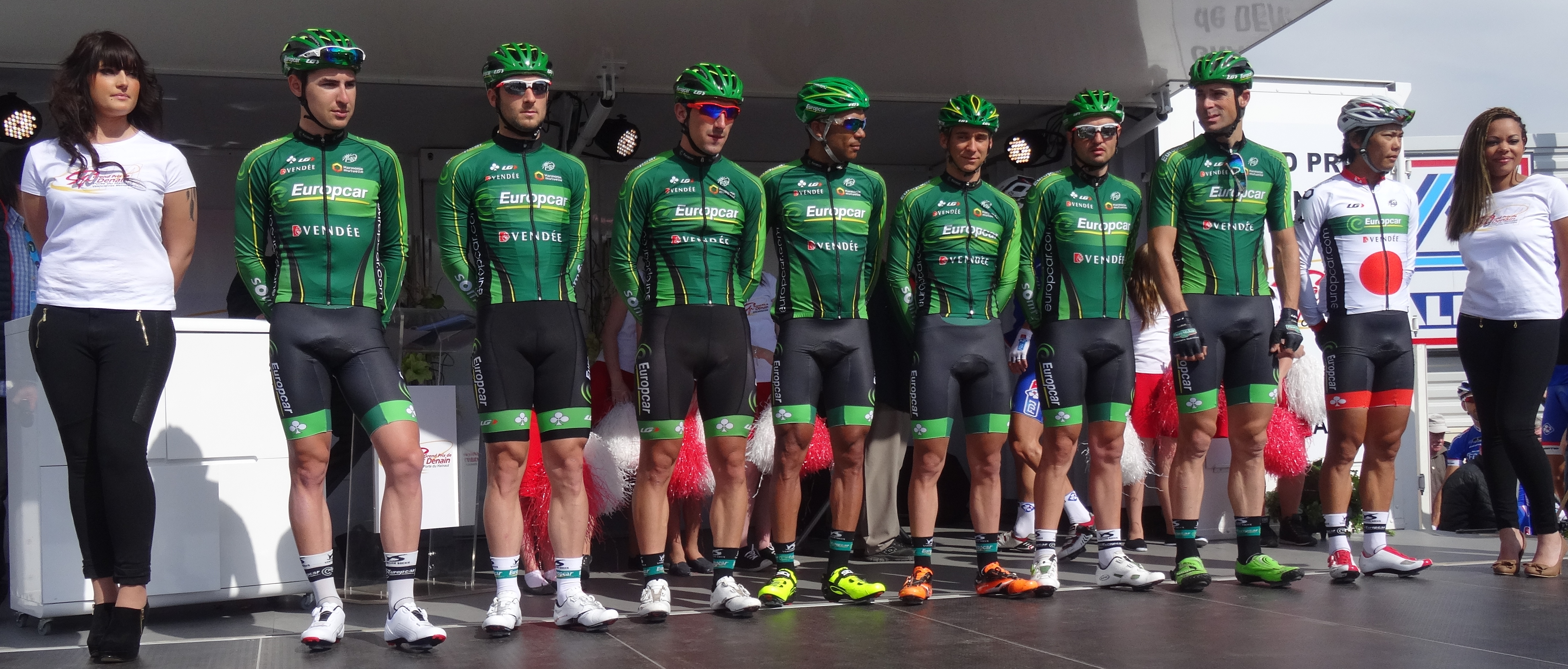 Reportage réalisé le jeudi 17 avril à l'occasion du départ et de l'arrivée du Grand Prix de Denain 2014 à Denain, Nord, Nord-Pas-de-Calais, France.